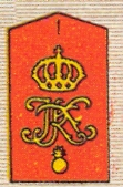 Achselklappe des Feldartillerie-Regiments König Karl (1. Württembergisches) Nr. 13; Mannschaften.